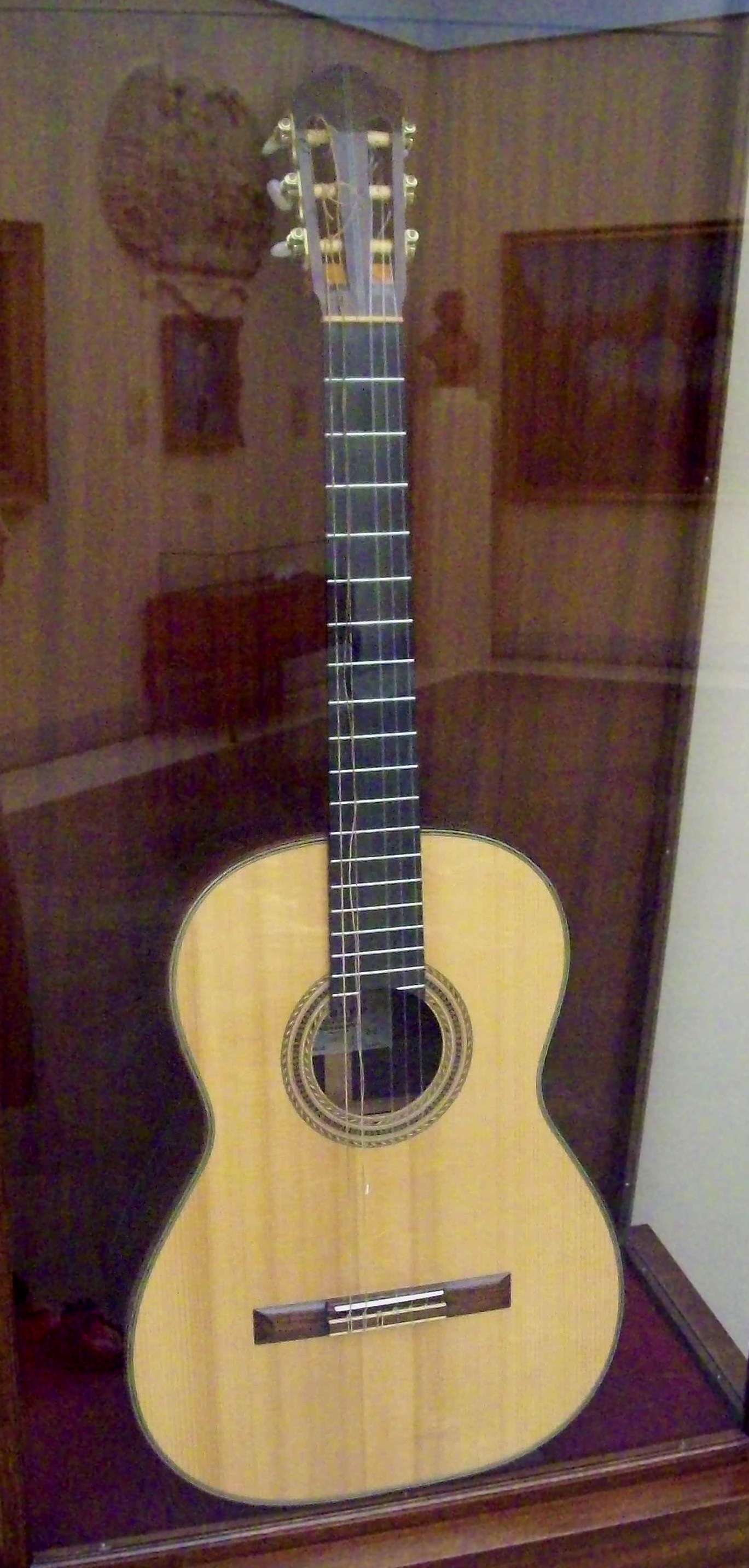 Guitar of Andrés Segovia (1893–1987).